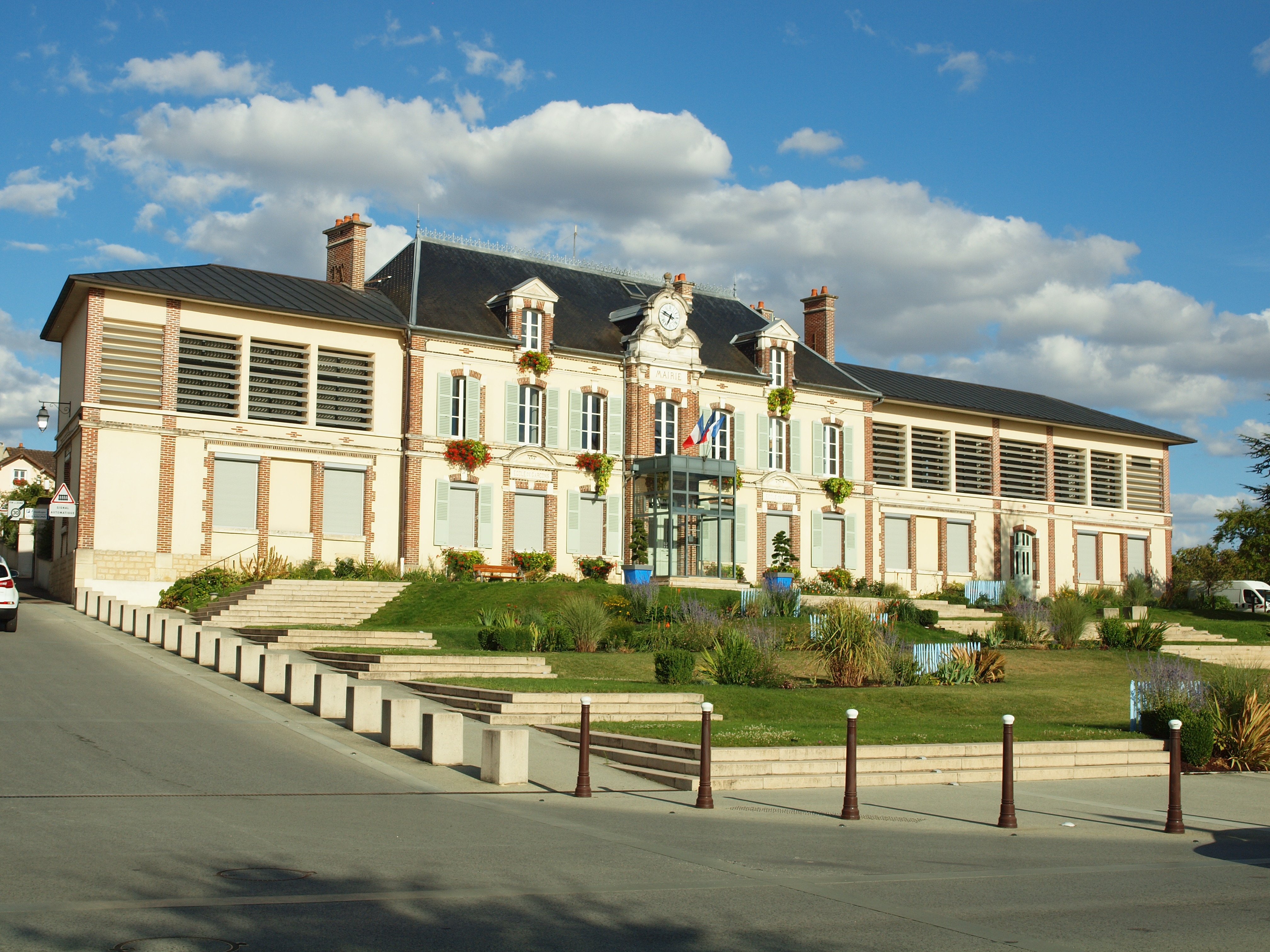 Mairie de Monéteau (Yonne, France)